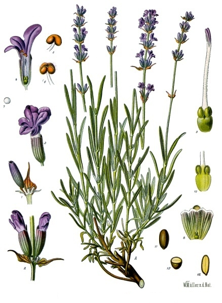 Lavendel. A blühende Pflanze, natürl. Grösse; 1 Zweigstück mit Kelch und Deckblatt, vergrössert; 2 Zweigstück mit 2 Blüthen, desgl.; 3 Blüthe, desgl.; 4 dieselbe im Längsschnitt, desgl.; 5 Staubgefäss, desgl.; 6 dasselbe, geöffnet, desgl.; 7 Pollen, desgl.; 8 Stempel mit aufgeschnittenem Kelche, desgl.; 9 Stempel, stärker vergrössert; 10 unterer Theil des Stempels mit Scheibe, zerschnitten, desgl.; 11 Same, desgl.; 12, 13 derselbe im Quer- und Längschnitt desgl.